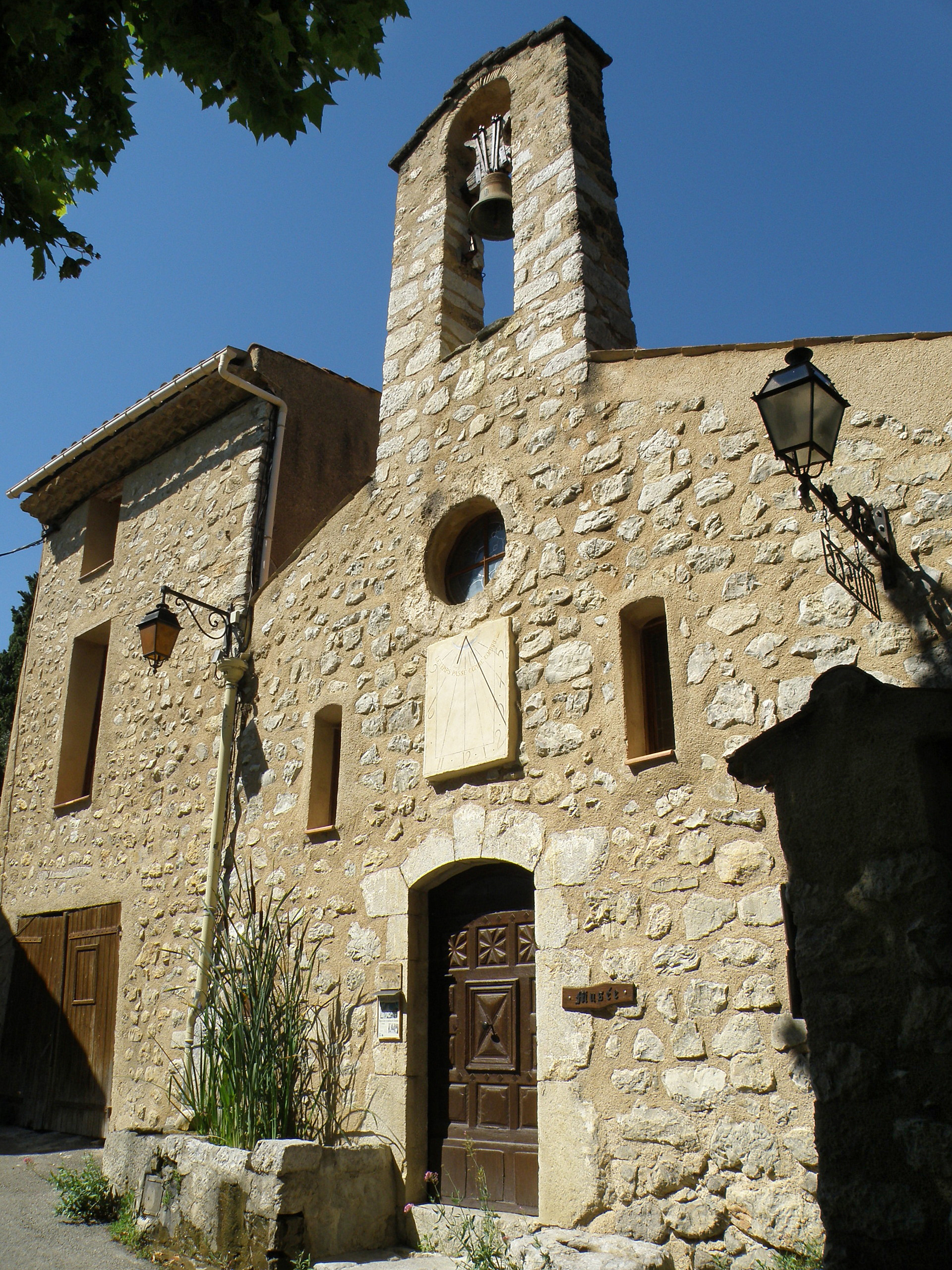 La Roche-sur-le-Buis (dép. de la Drôme, France). Chapelle Notre-Dame-de-Pitié, dans le vieux bourg.